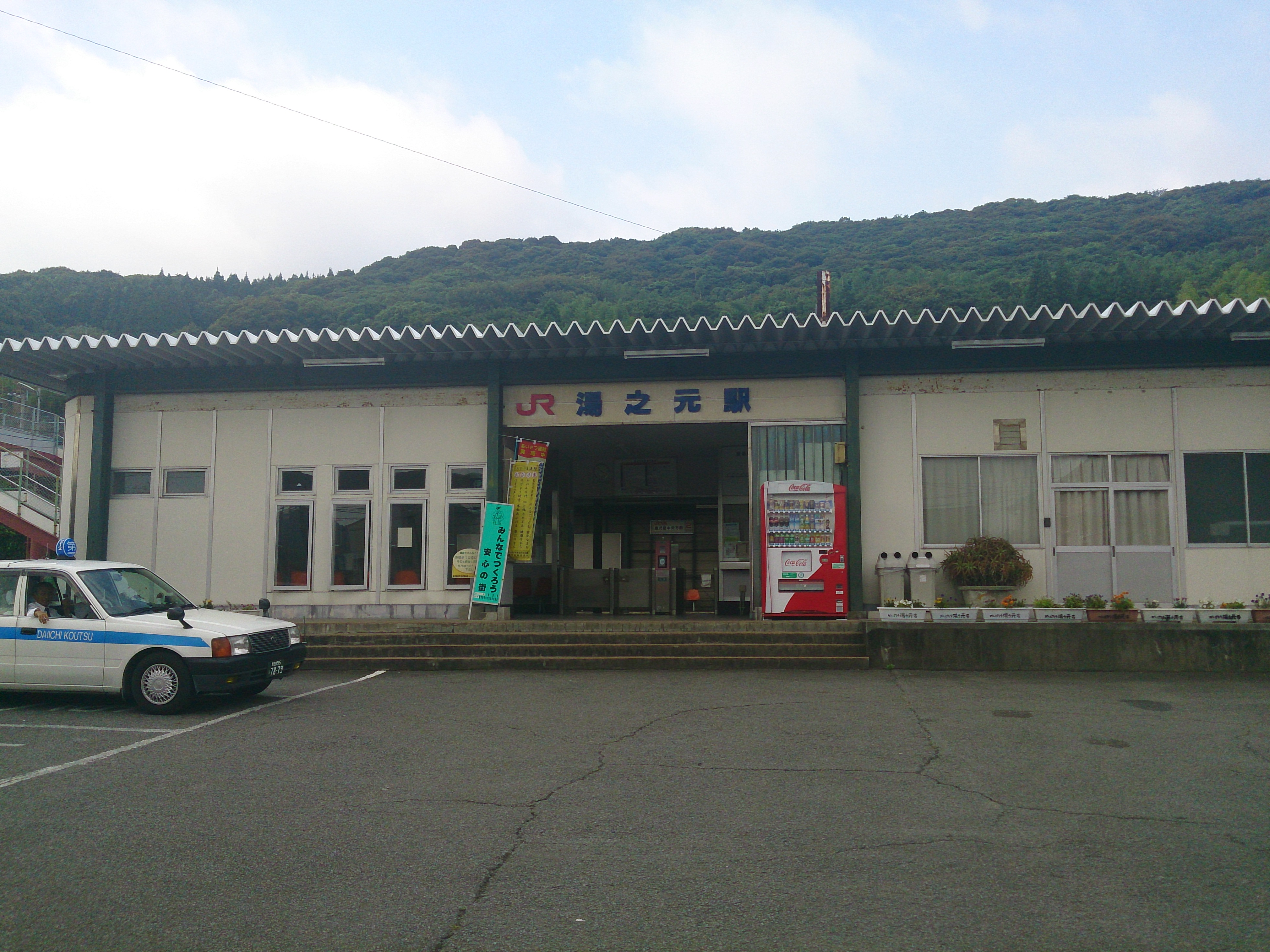 湯之元駅駅舎